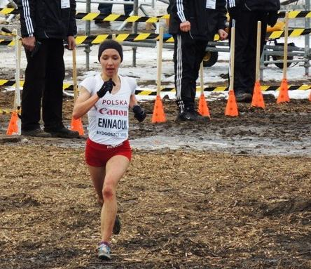 Sofia Ennaoui podczas Mistrzostw Świata w Biegach Przełajowych Bydgoszcz 2013